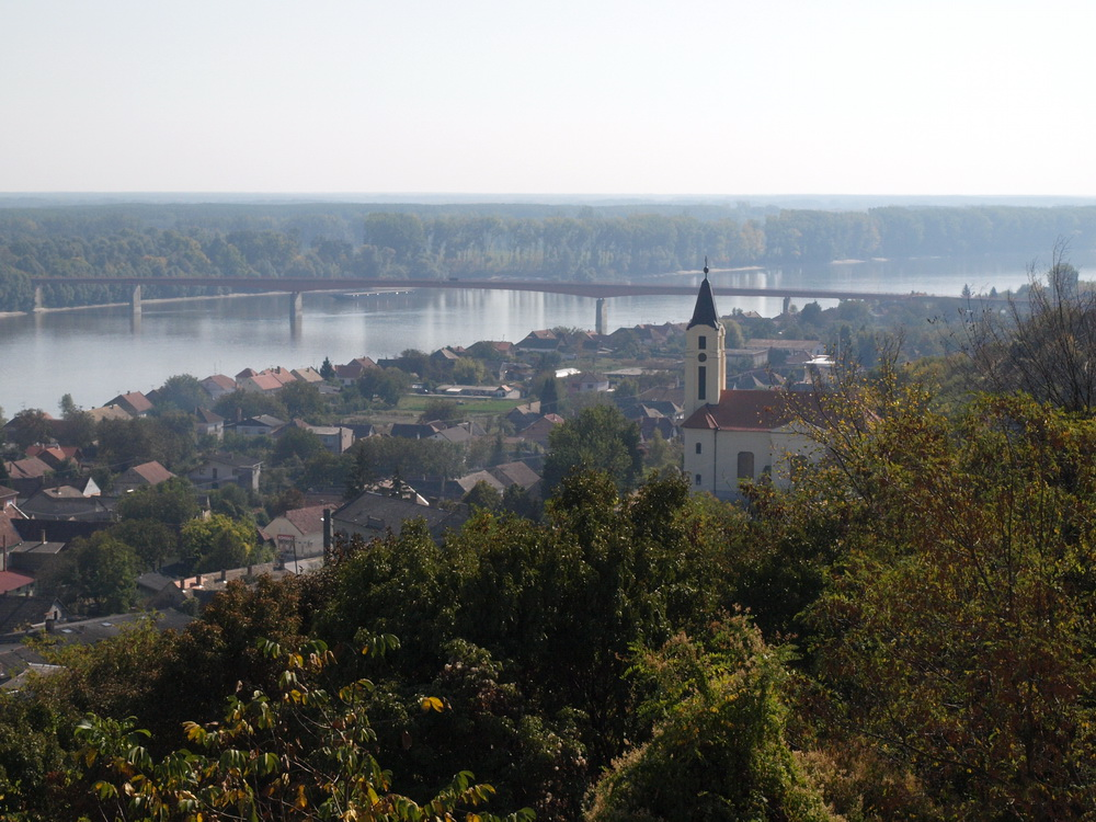 Naselje Batina (pogled sa spomenika).